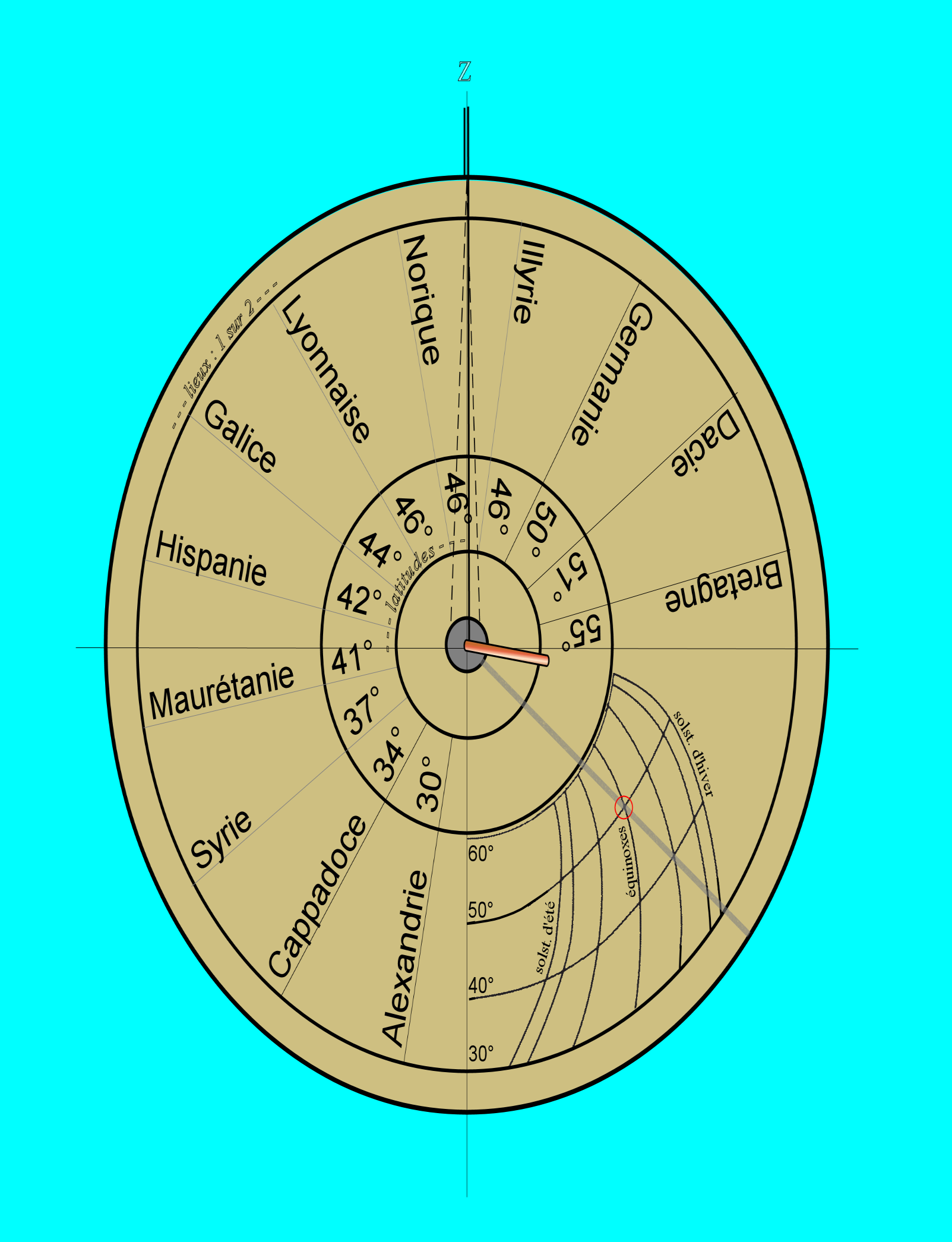 Vue du cadran en station : le jour de l'équinoxe, à midi supposé, la latitude relevée est de 50° ; d'après Denis Savoie.